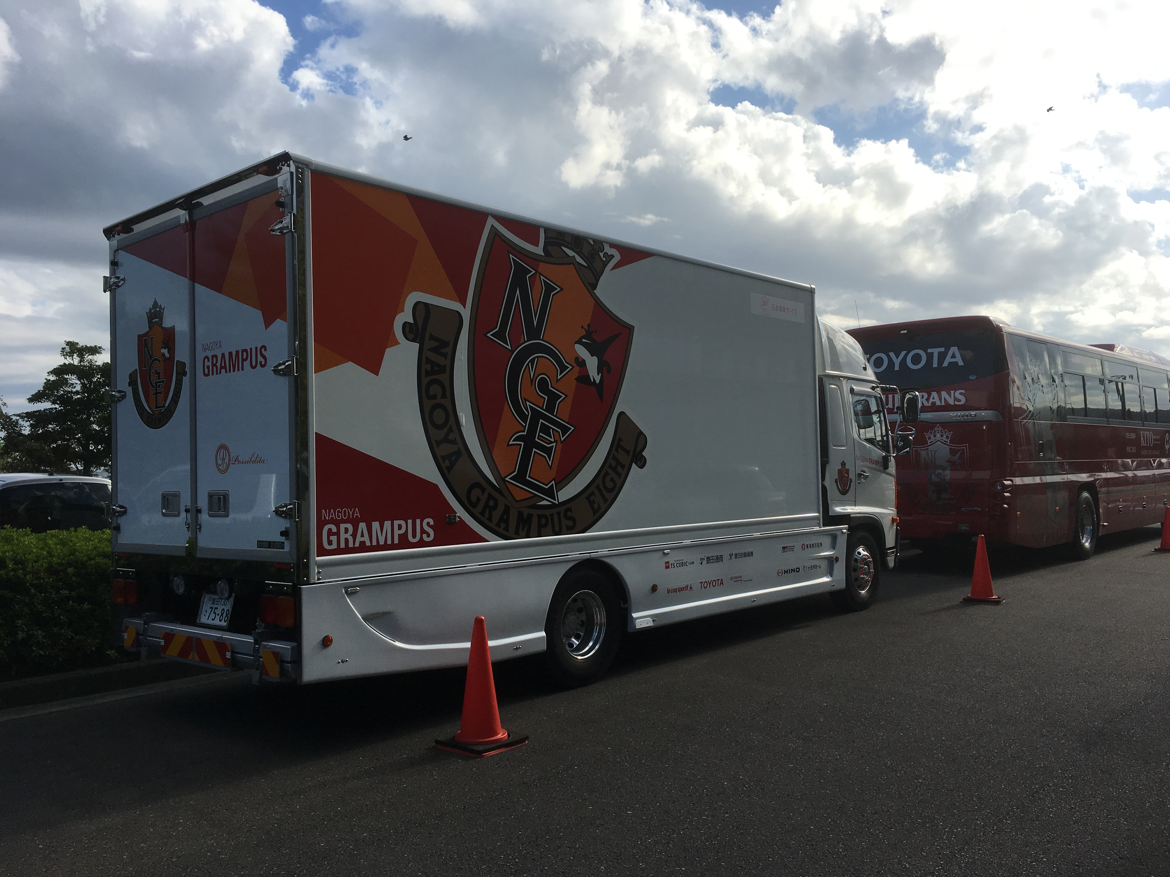 清水ナショナルトレーニングセンター（静岡県静岡市）にて撮影。